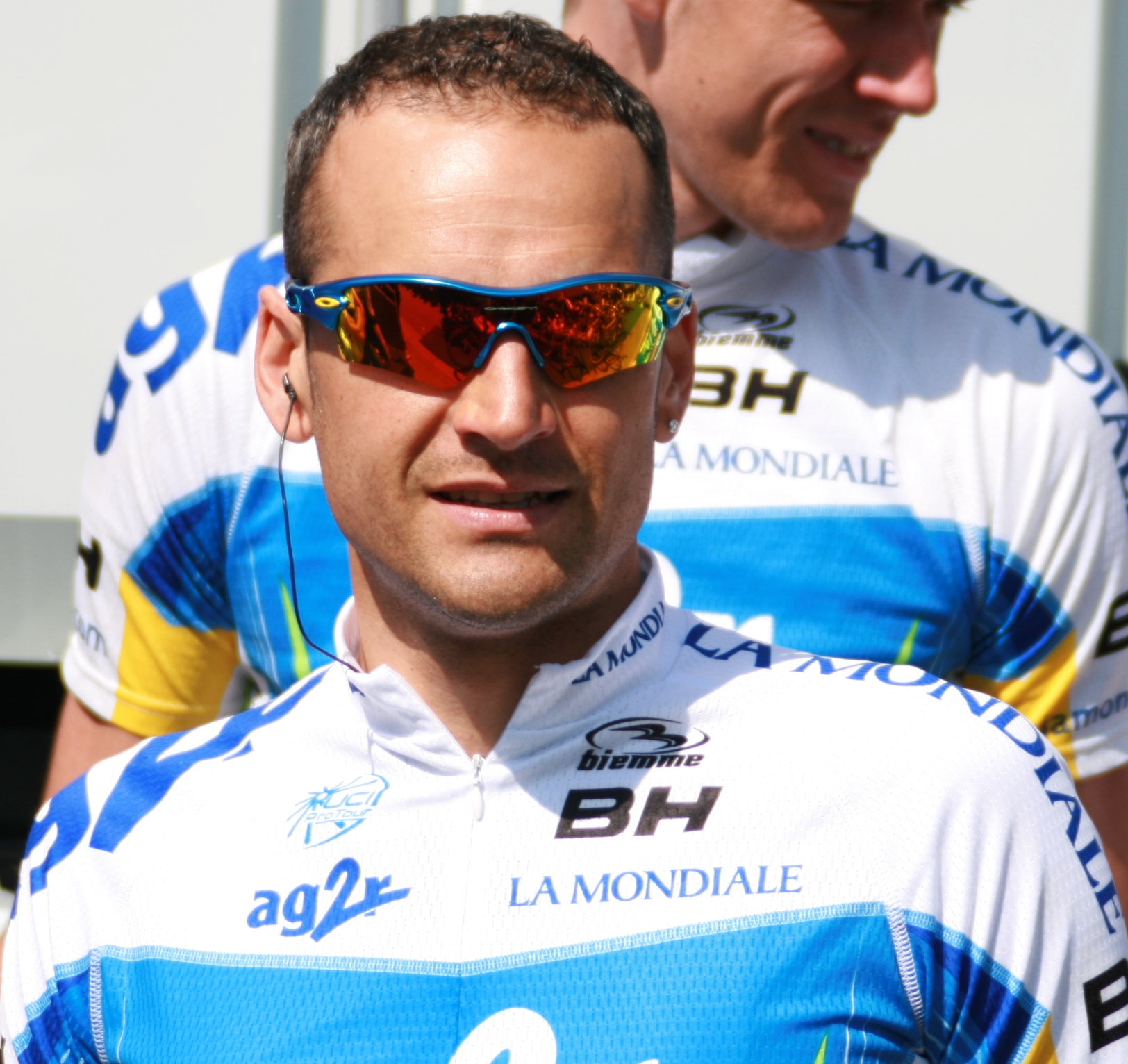 Cyril Dessel aux Quatre Jours de Dunkerque 2008